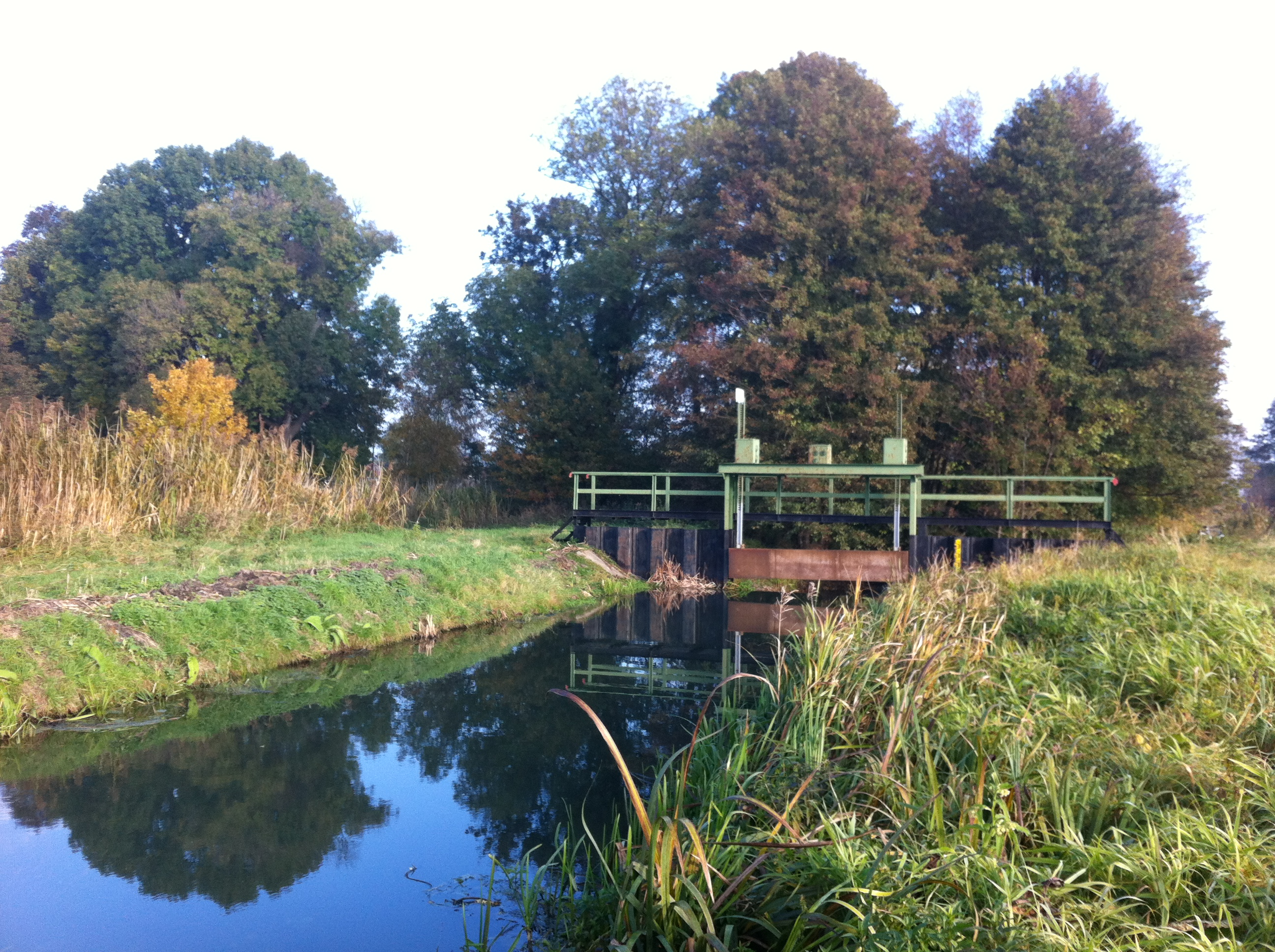 Stremme mit Wehr bei Neuenklitsche